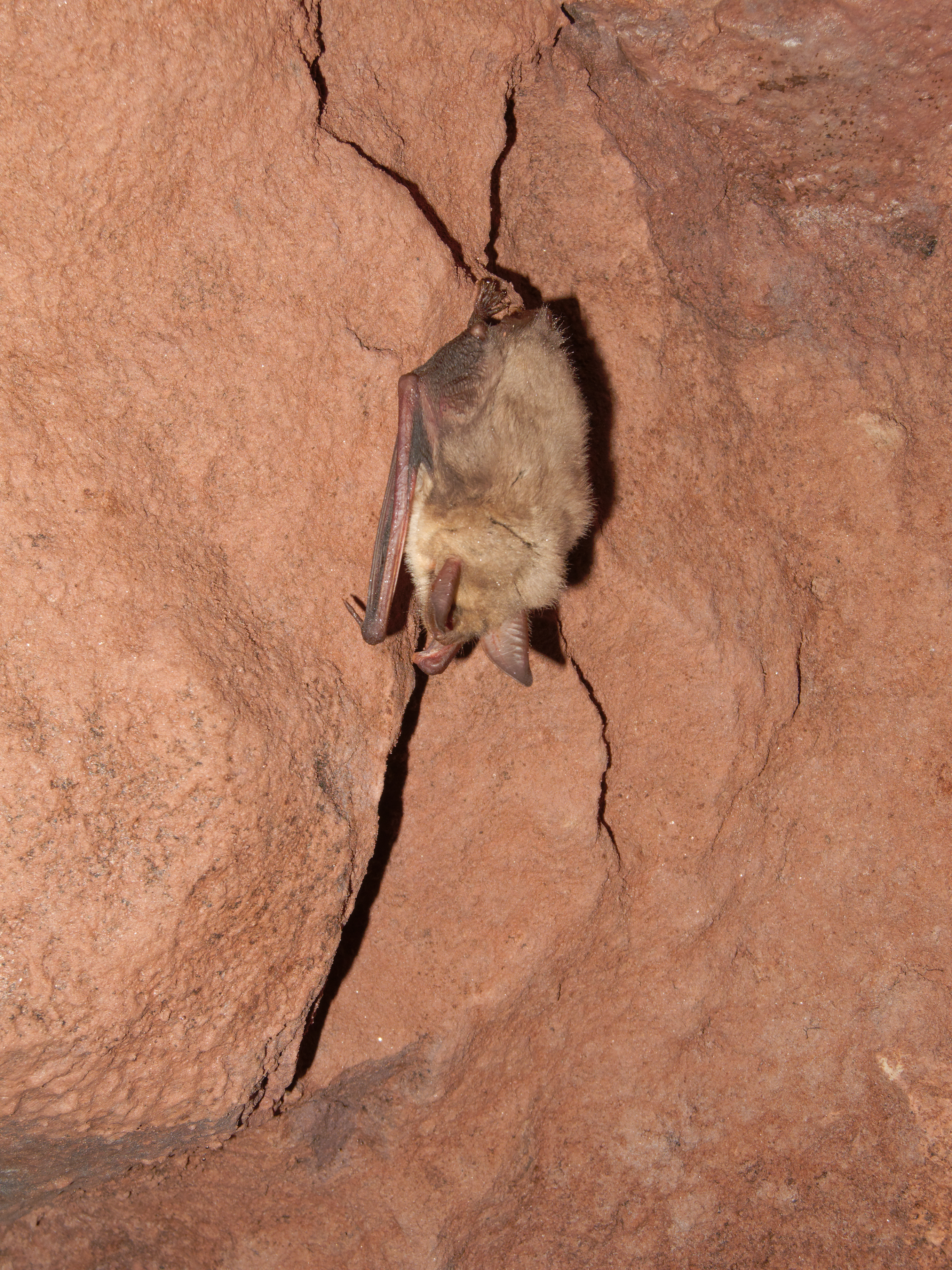 Une chauve-souris (chiroptera sp.) dans une galerie.